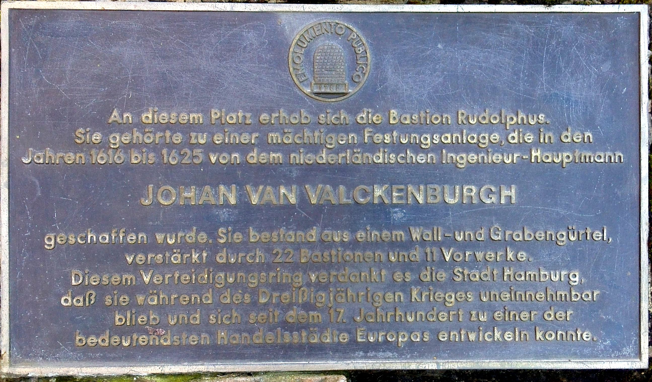 Gedenktafel an Johann van Valckenburg, den Architekten der Wallanlagen in Hamburg. Gestiftet von der Patriotischen Gesellschaft. Standort: In Hamburg, Planten un Blomen, gegenüber den Tropengewächshäusern am Ende der Brücke.